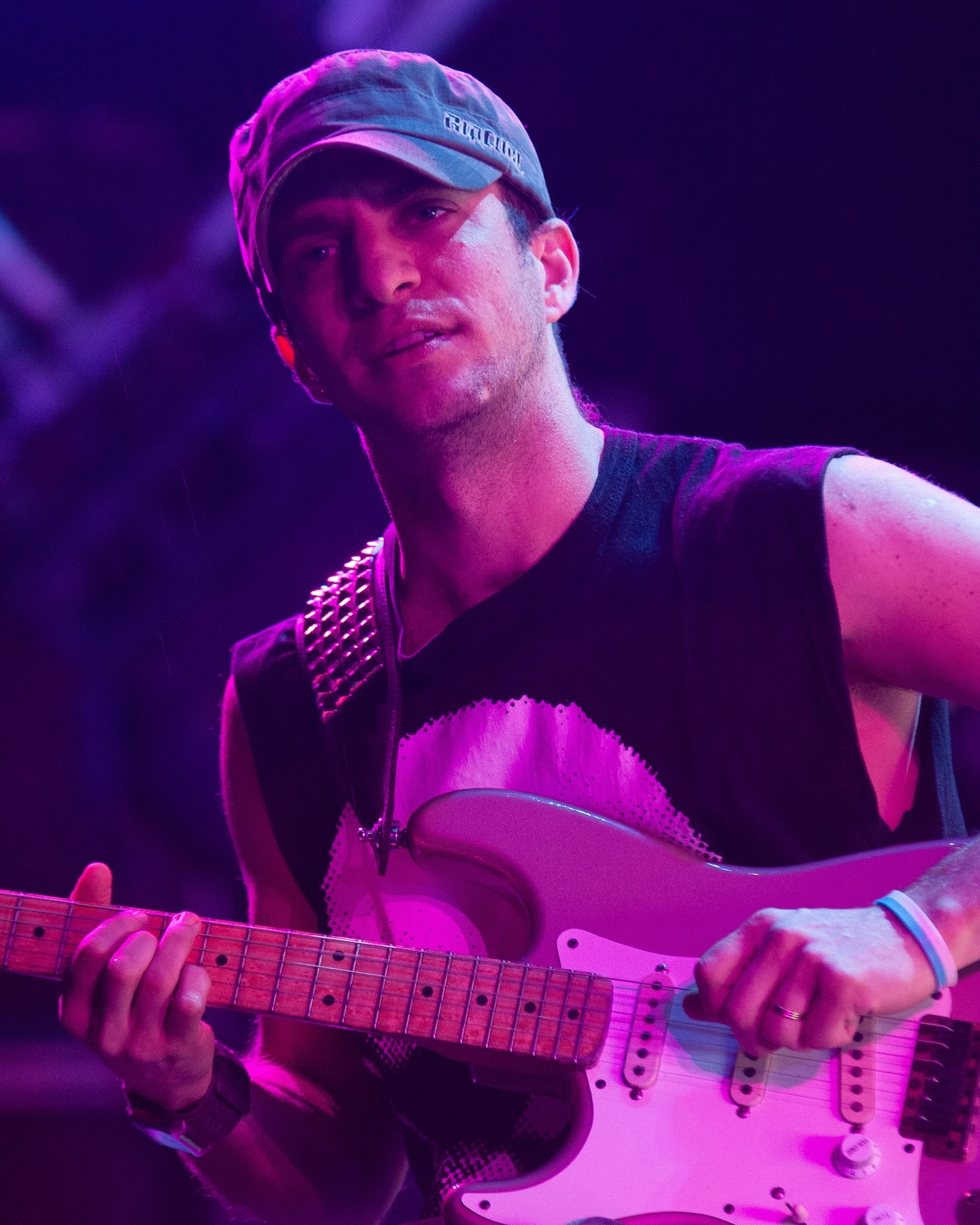 Tavo Kupinski - Los Piojos.